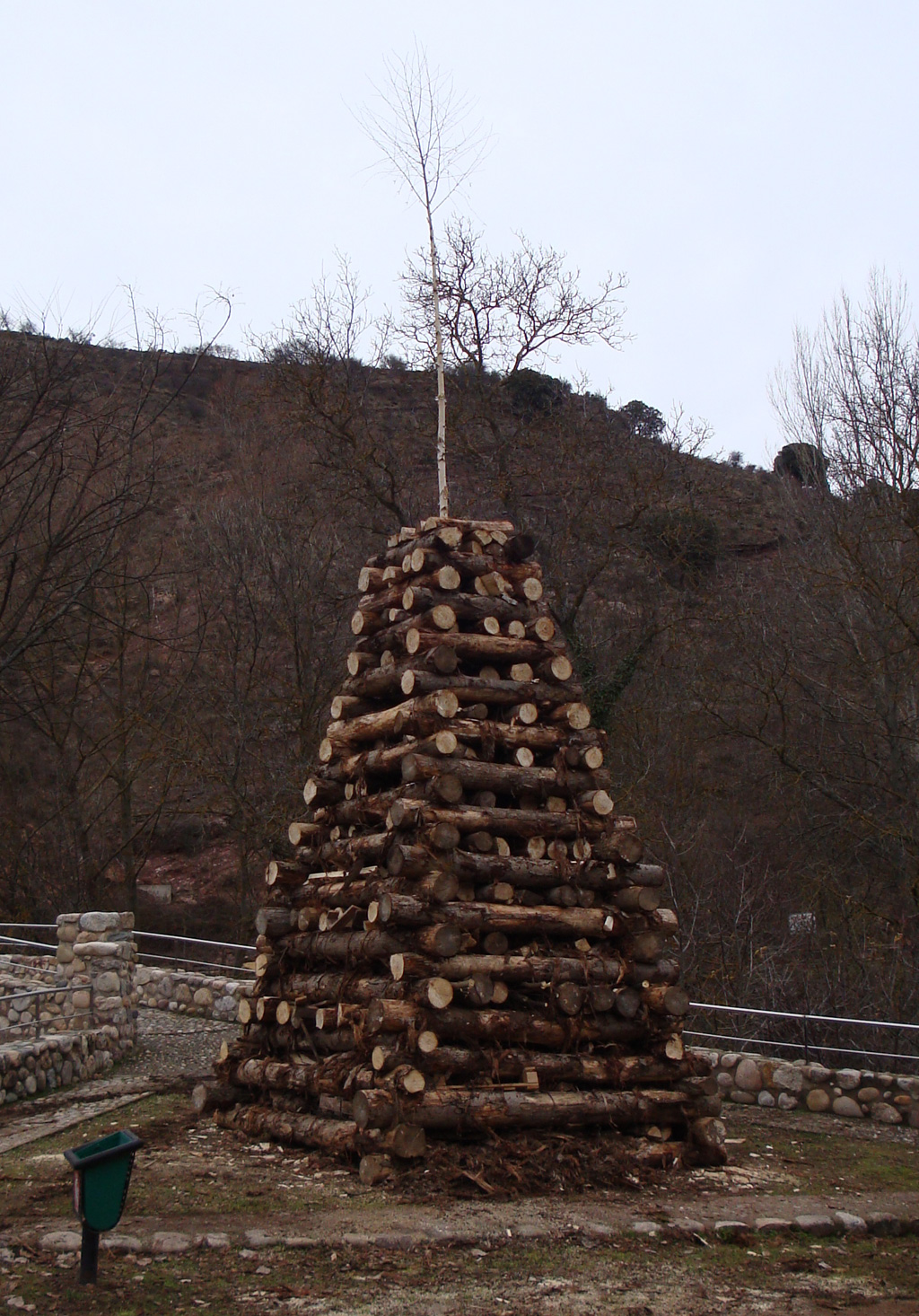 Pira de leña llamada "Chozo" que se quema el día de Nochevieja